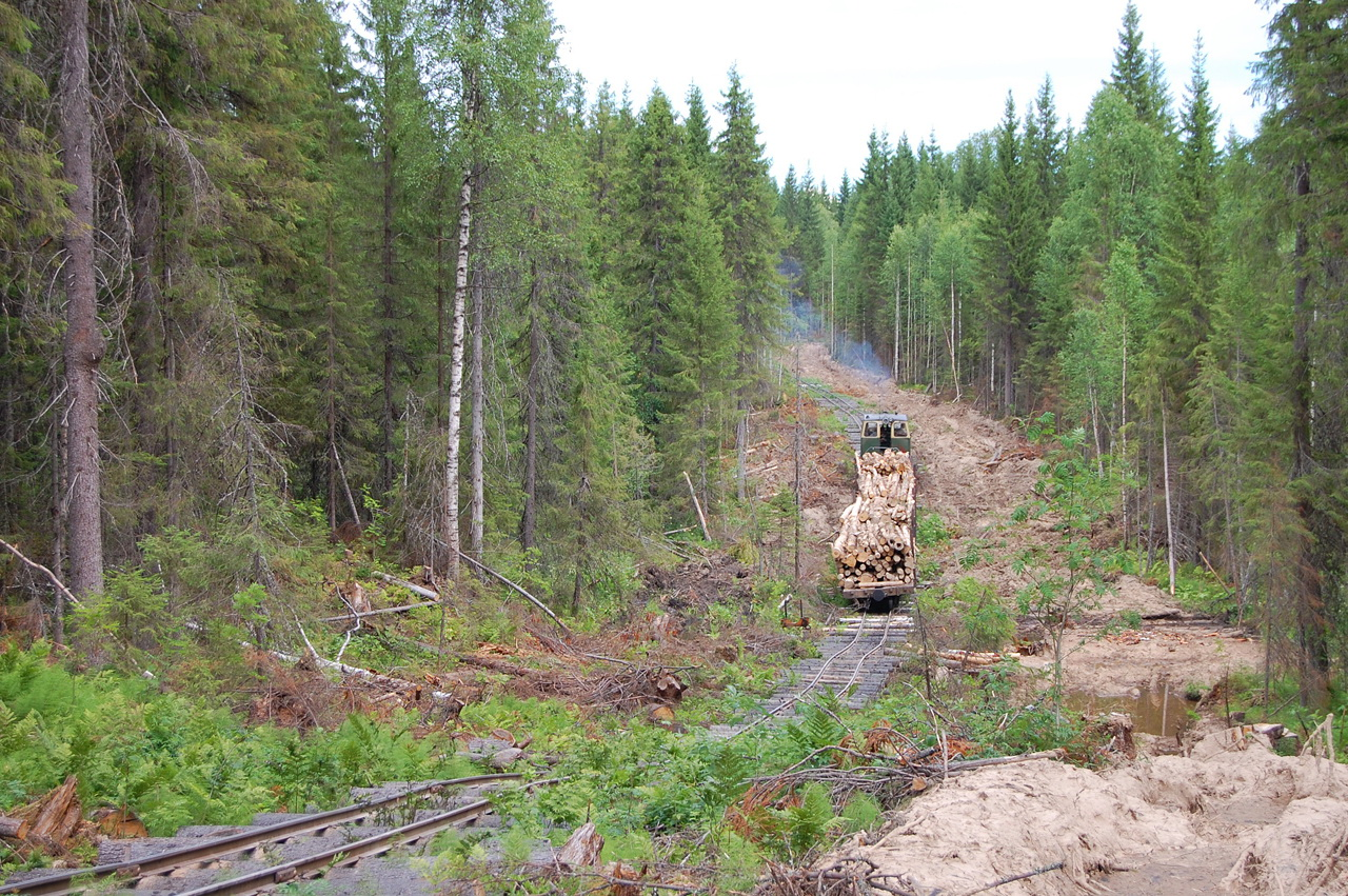 Харитоновская УЖД